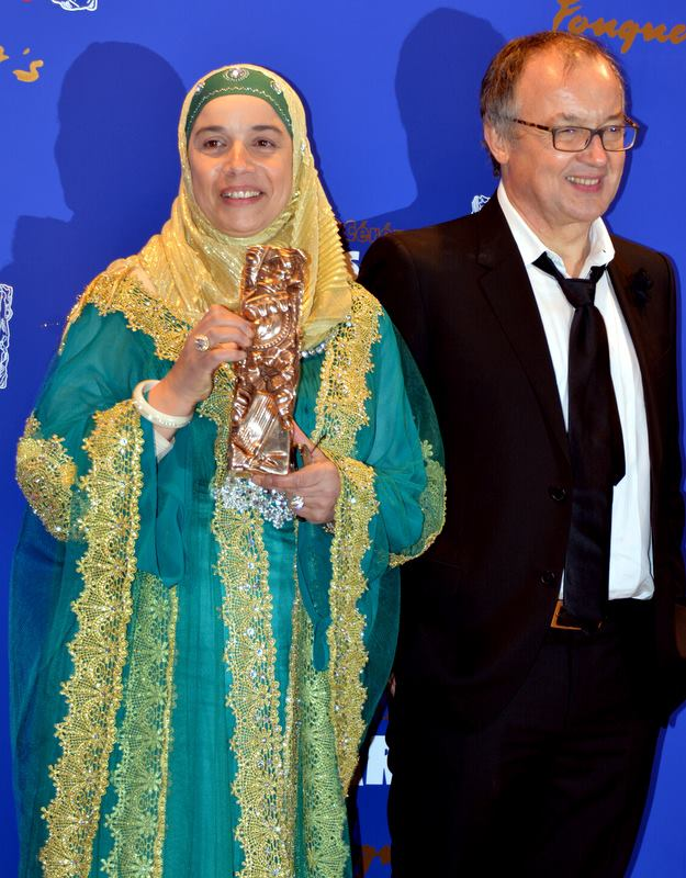 Soria Zeroual et Philippe Faucon à la cérémonie des César